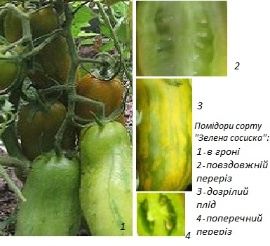 Помідори сорту "Зелена сосиска" з різних ракурсів